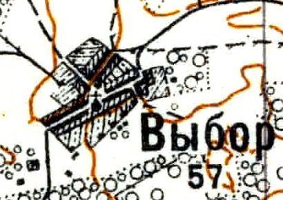 Топографическая карта Ленинградской области, квадрат Vc-29 (Батецкая), деревня Выбор